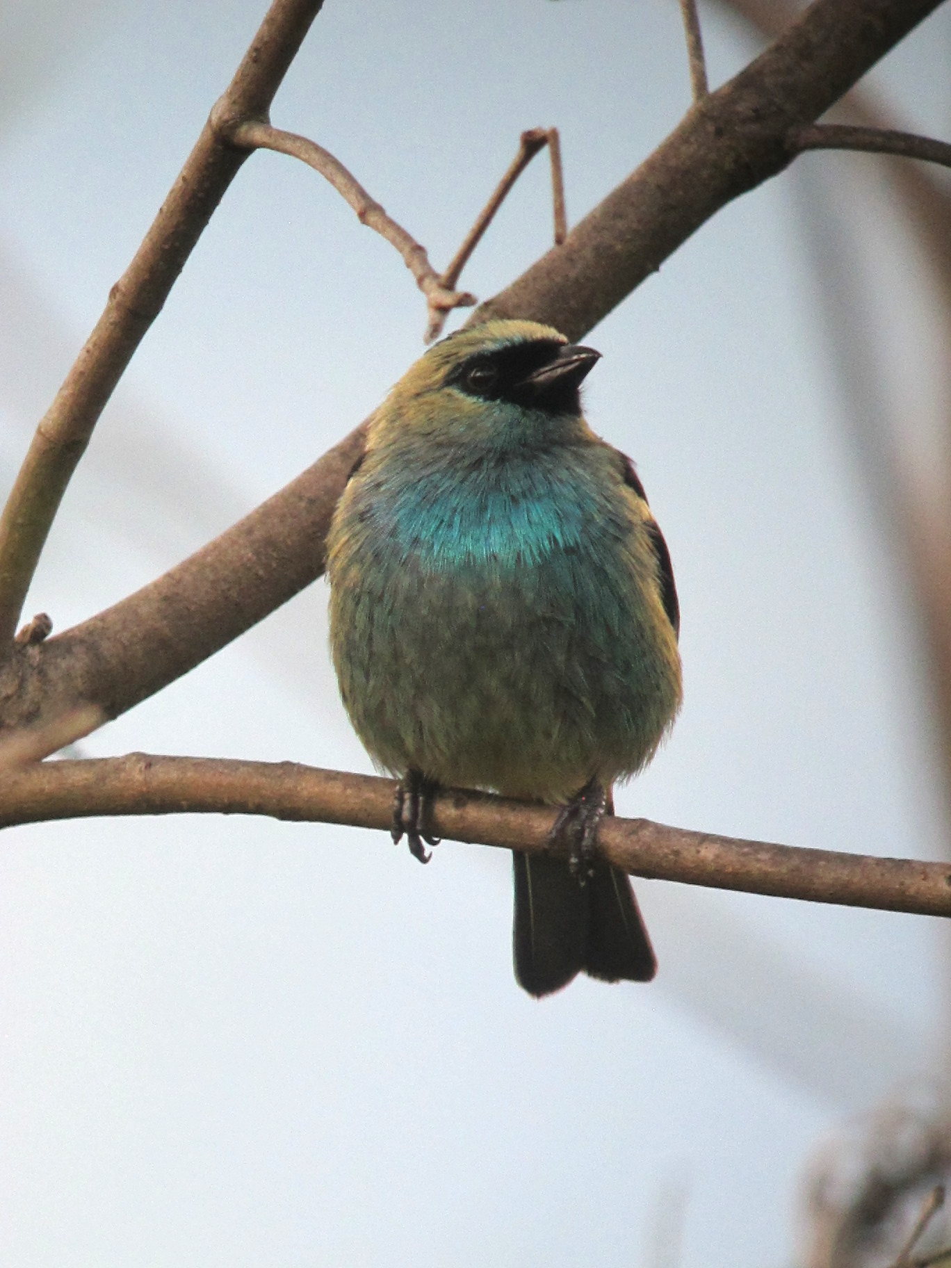 Sonsón, Antioquia, Colombia